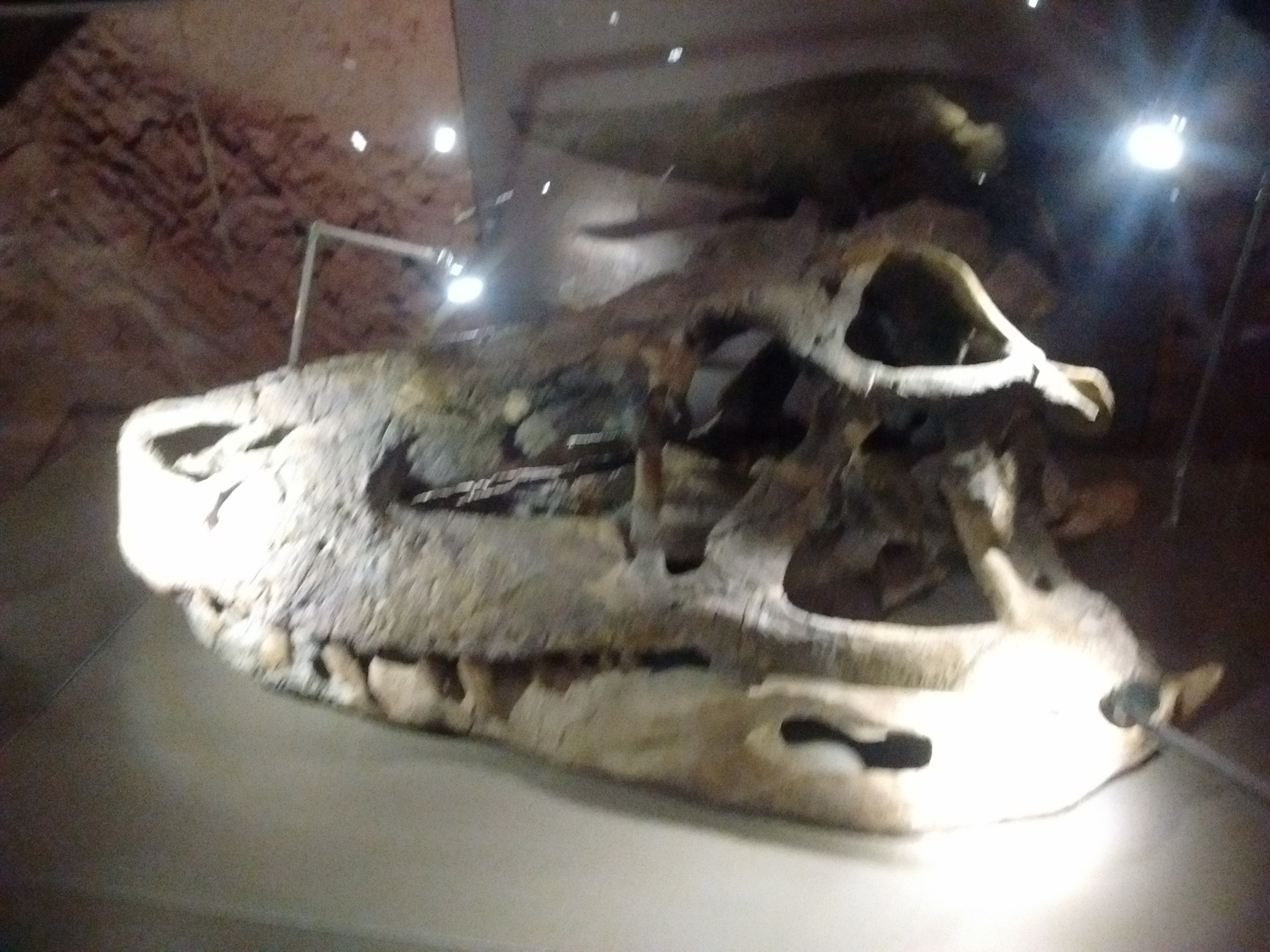 Fósil del cráneo del reptil